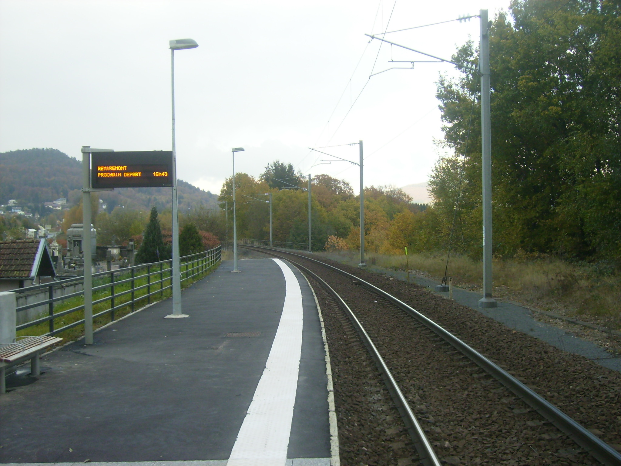 Gare de Saint-Nabord, Direction épinal